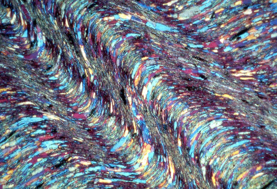 Krenulazio-cleavage